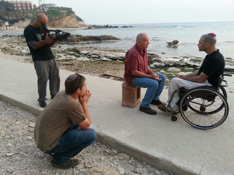 מתוך סדרת הטלוויזיה בגלל הרוח.